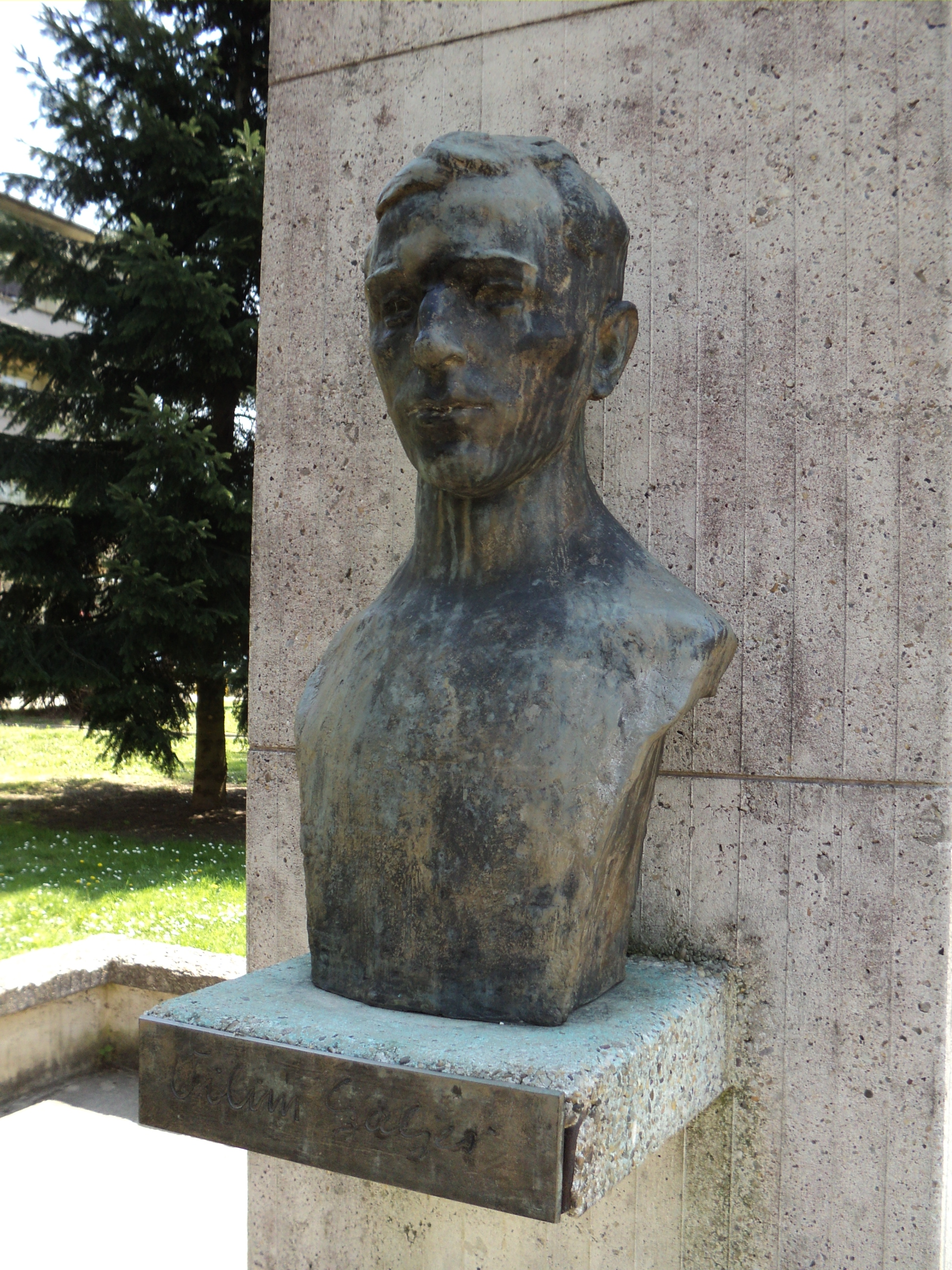 Bista narodnog heroja Vilima Galjera u Đurđevcu.